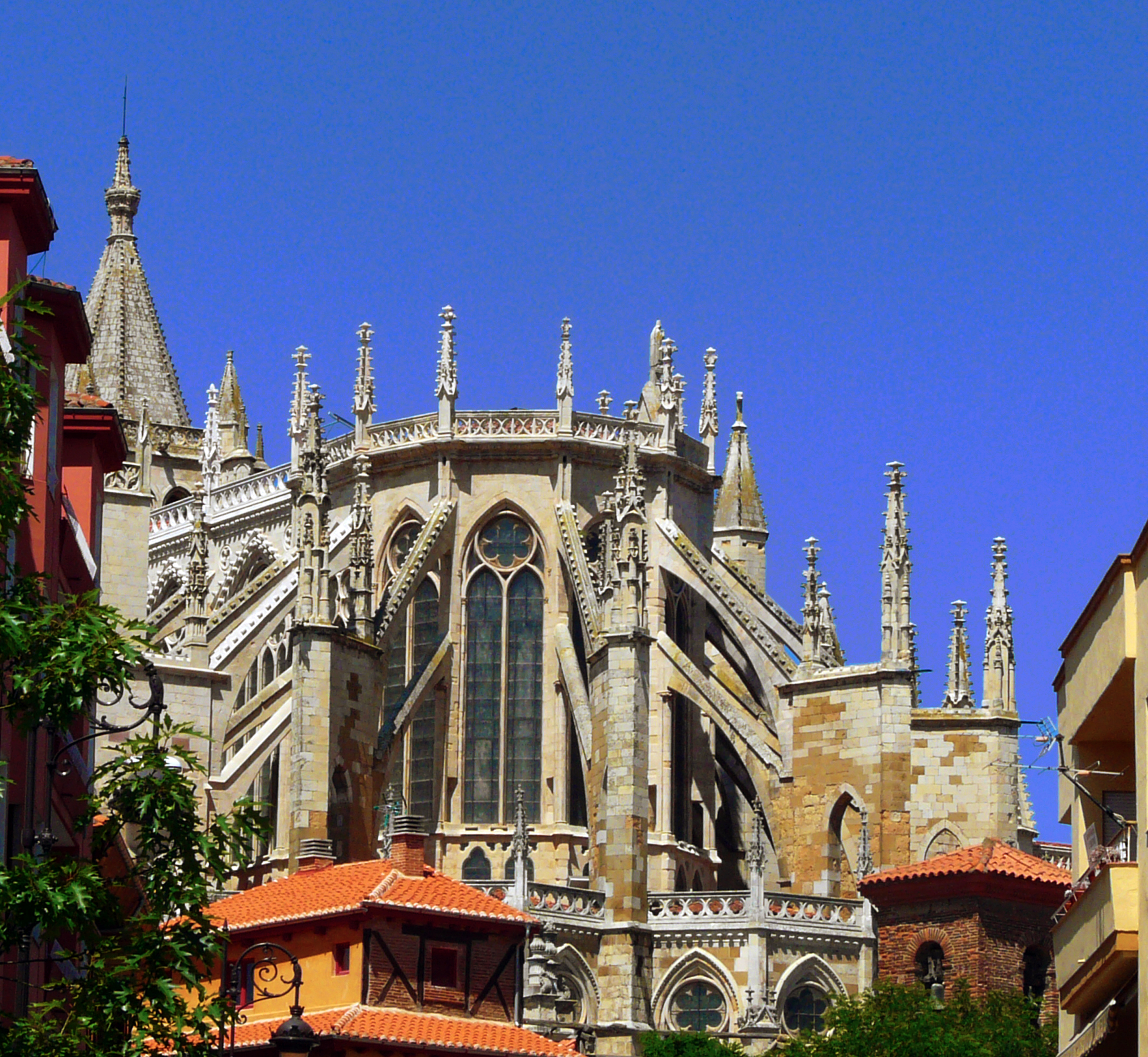 Ábside de la Catedral de León. León Cathedral Native nameCatedral de LeónLocationLeón, (Spain)Coordinates42° 35′ 58″ N, 5° 34′ 00″ W EstablishedMiddle AgeWeb page control : Q175874 VIAF: 148926357 LCCN: n80144988 BIC: RI-51-0000001 GND: 4392441-4 SUDOC: 033212880 WorldCat institution QS:P195,Q175874